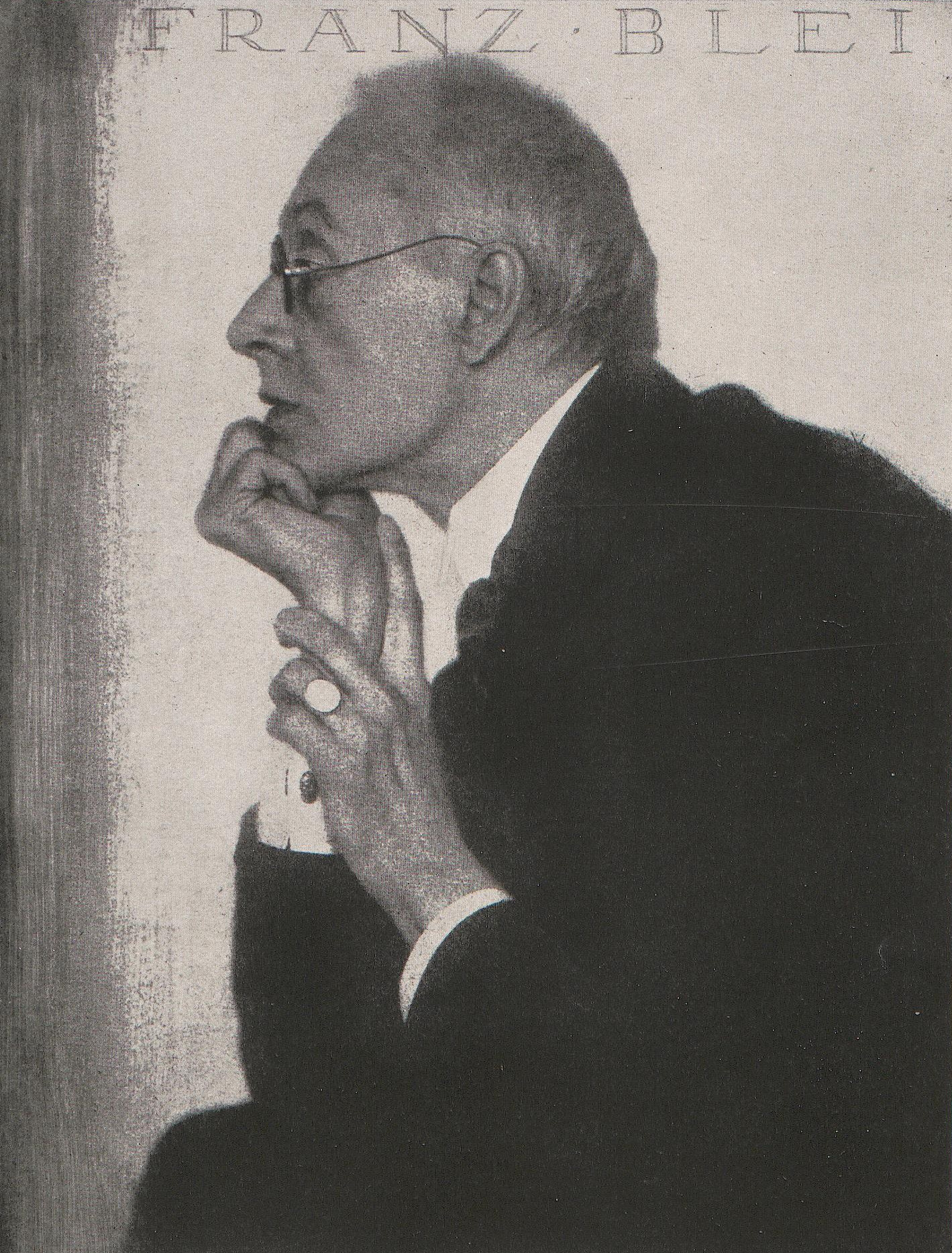 Der Literat Franz Blei